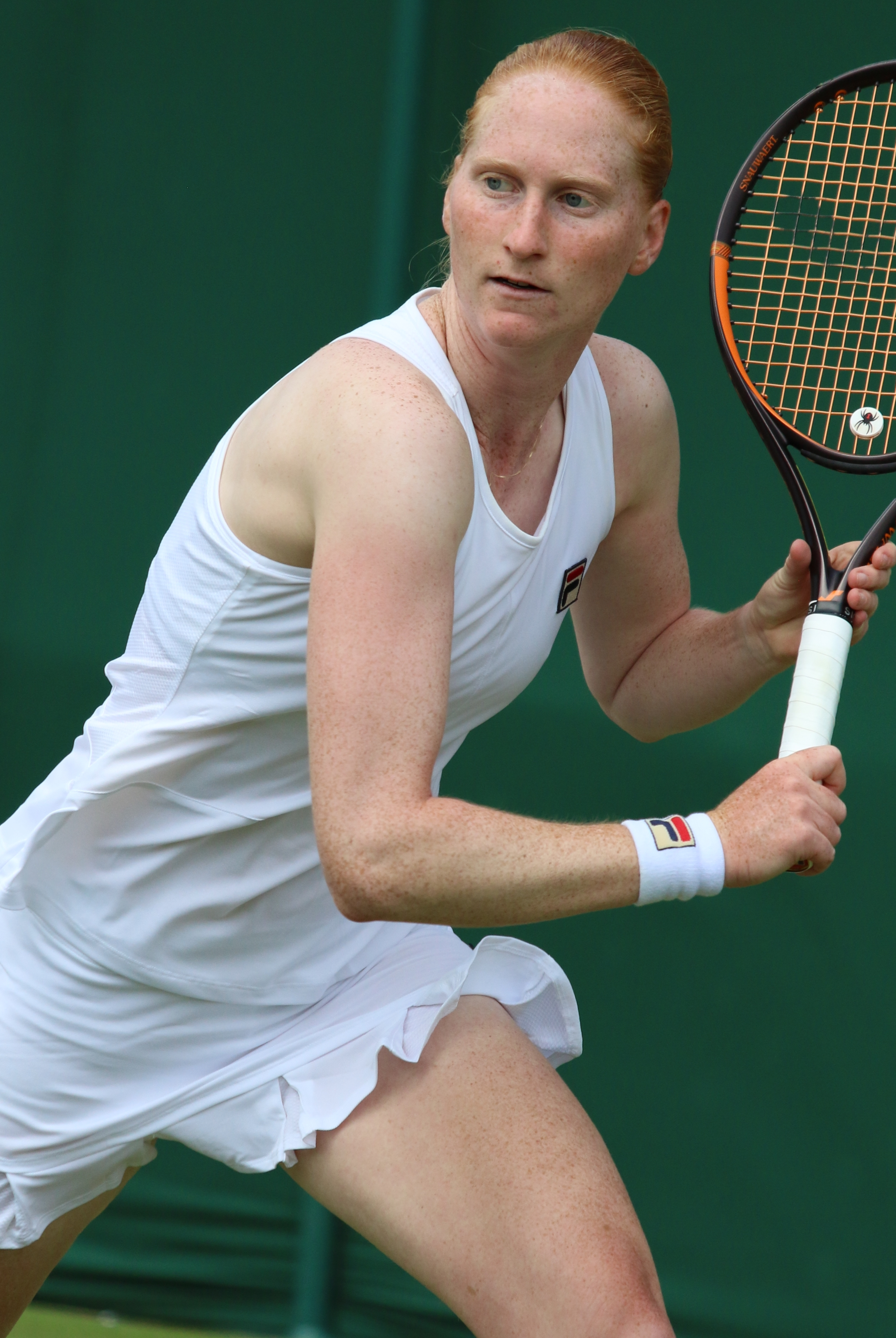 van Uytvanck WM19 (18)